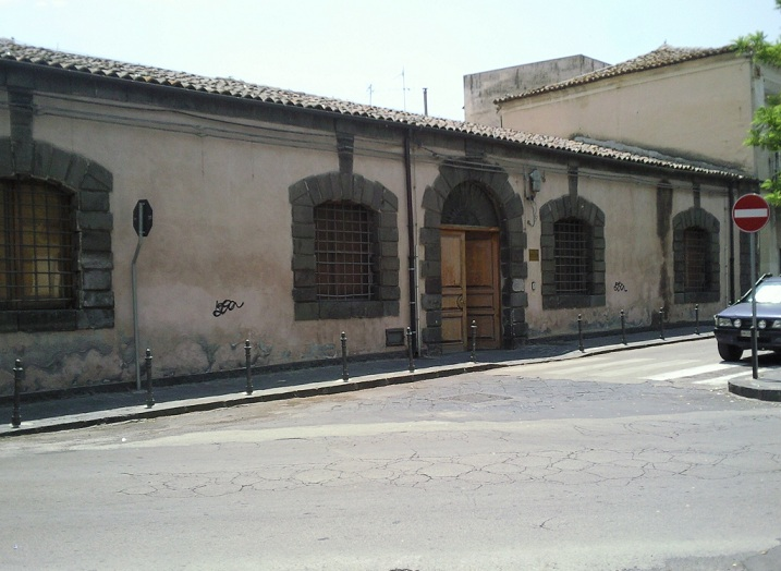 L'ex carcere borbonico di Paternò (CT), risalente agli inizi dell'Ottocento